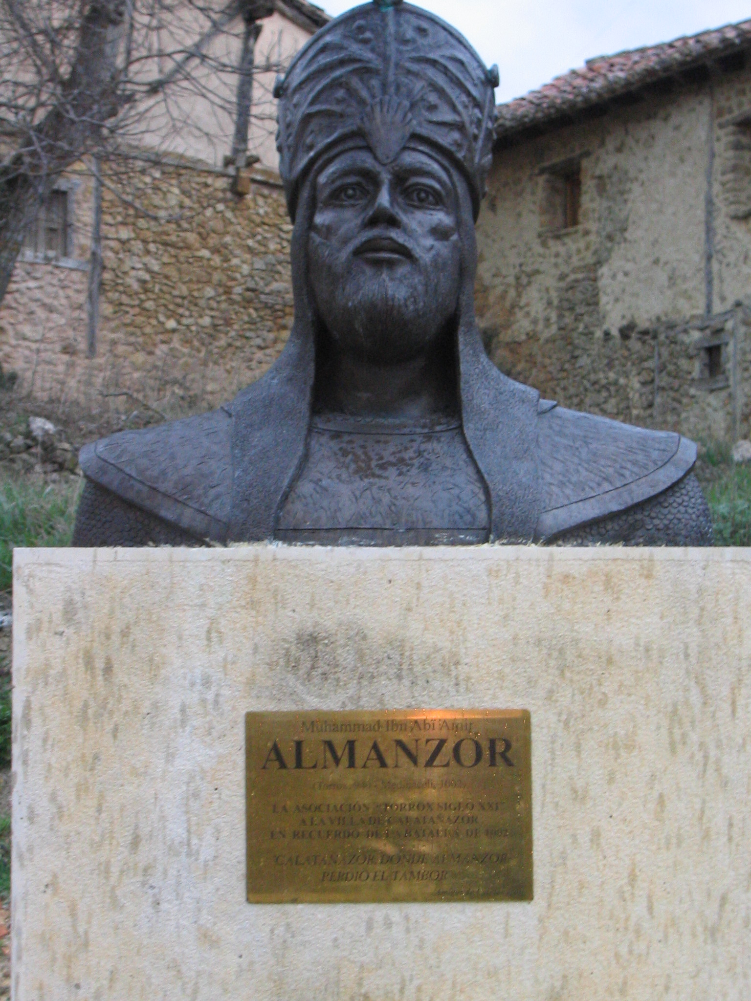 Busto de Almanzor en Calatañazor, Soria (Castilla León) (España).